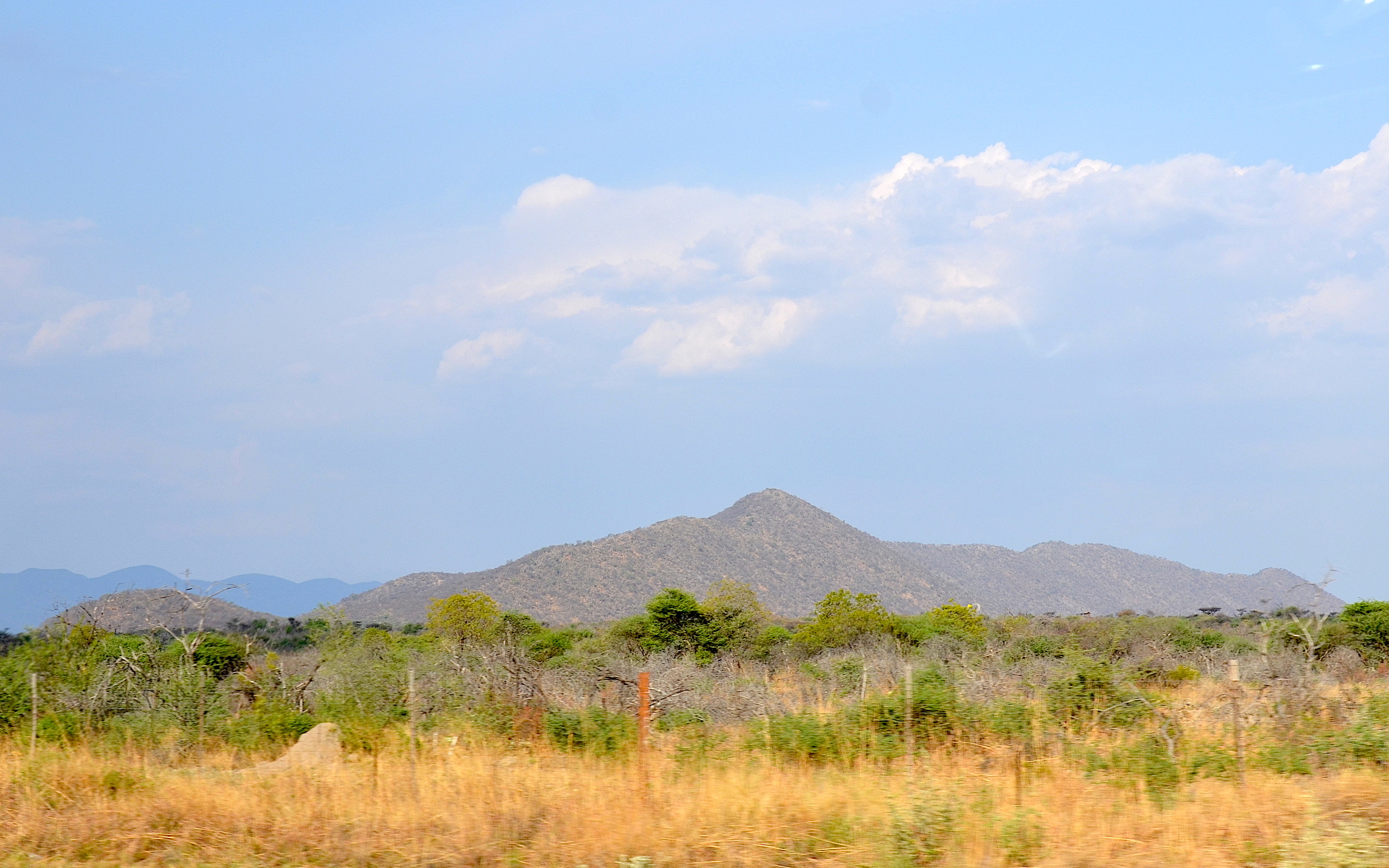 Elefantenberg bei Otavi in Namibia (2014)